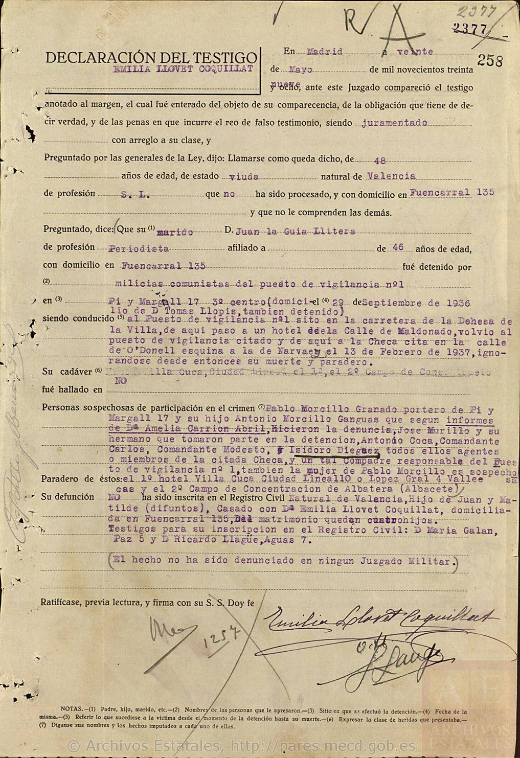 Declaración del testigo